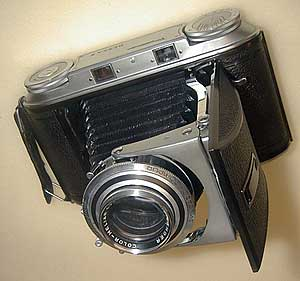 Voigtländer Bessa-II mit Color-Heliar 3.5/105